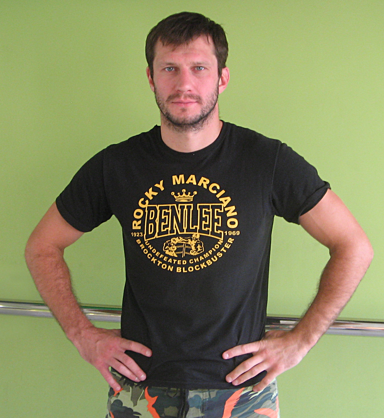 Игорь Михалкин. Иркутск, 2016 год.